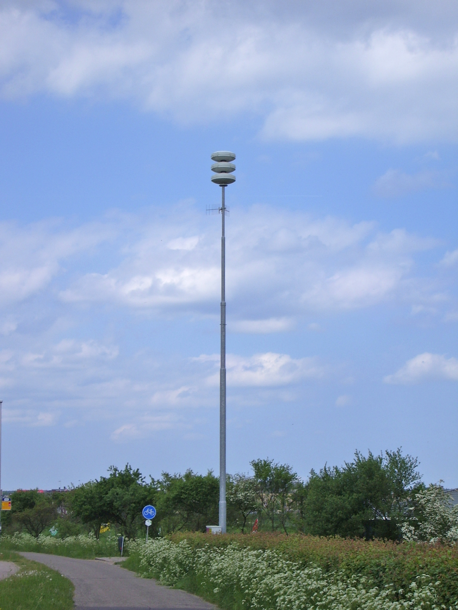 Installatie voor luchtalarm op paal (Public alert system), ontwerp door Bert Hennink